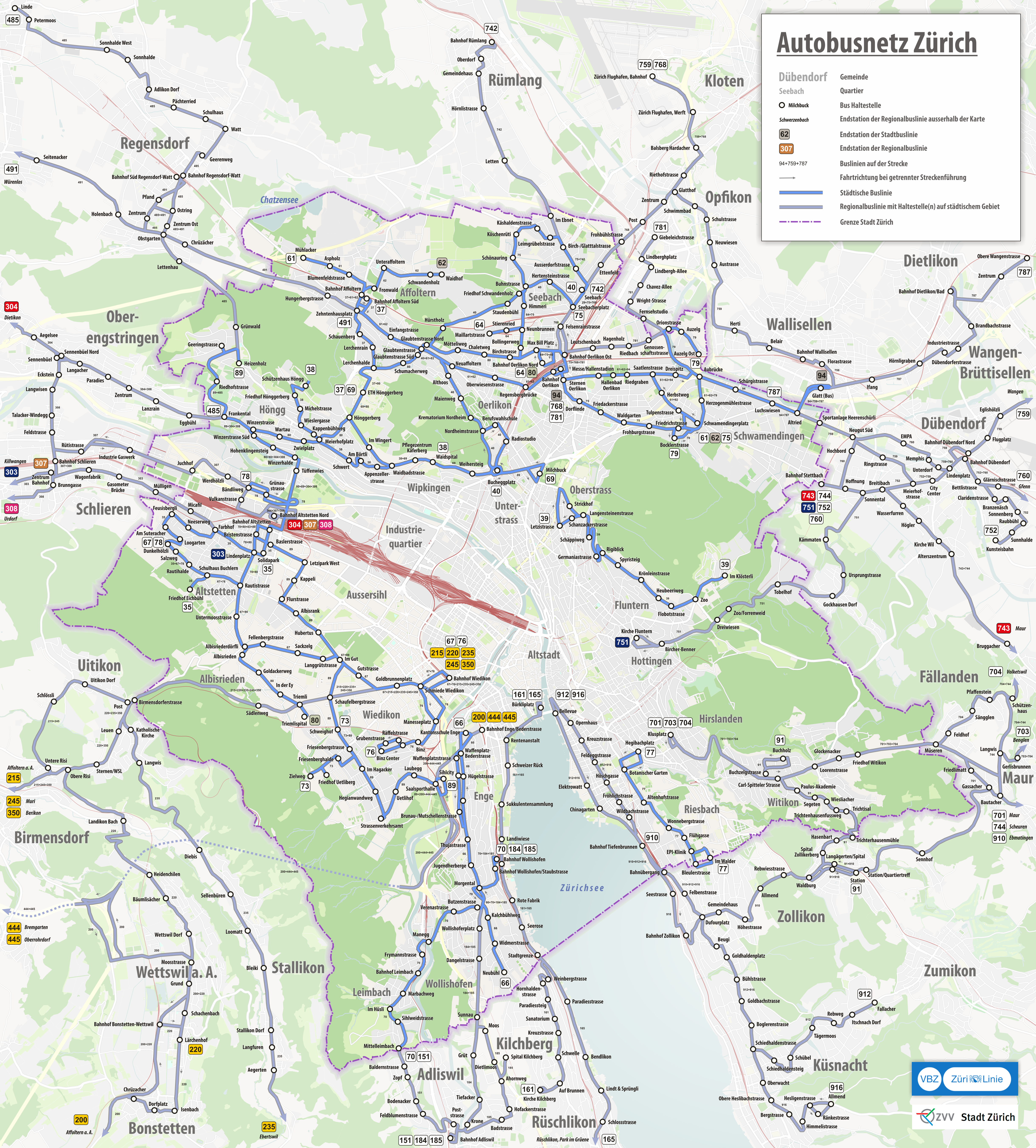 Busnetz der Verkehrsbetriebe Zürich (VBZ), ab August 2020